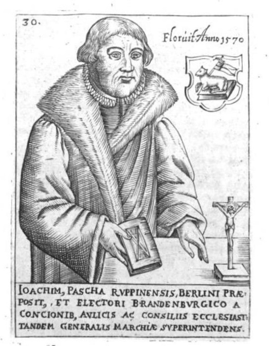 Bildnis Joachim Pascha (1527–1578)